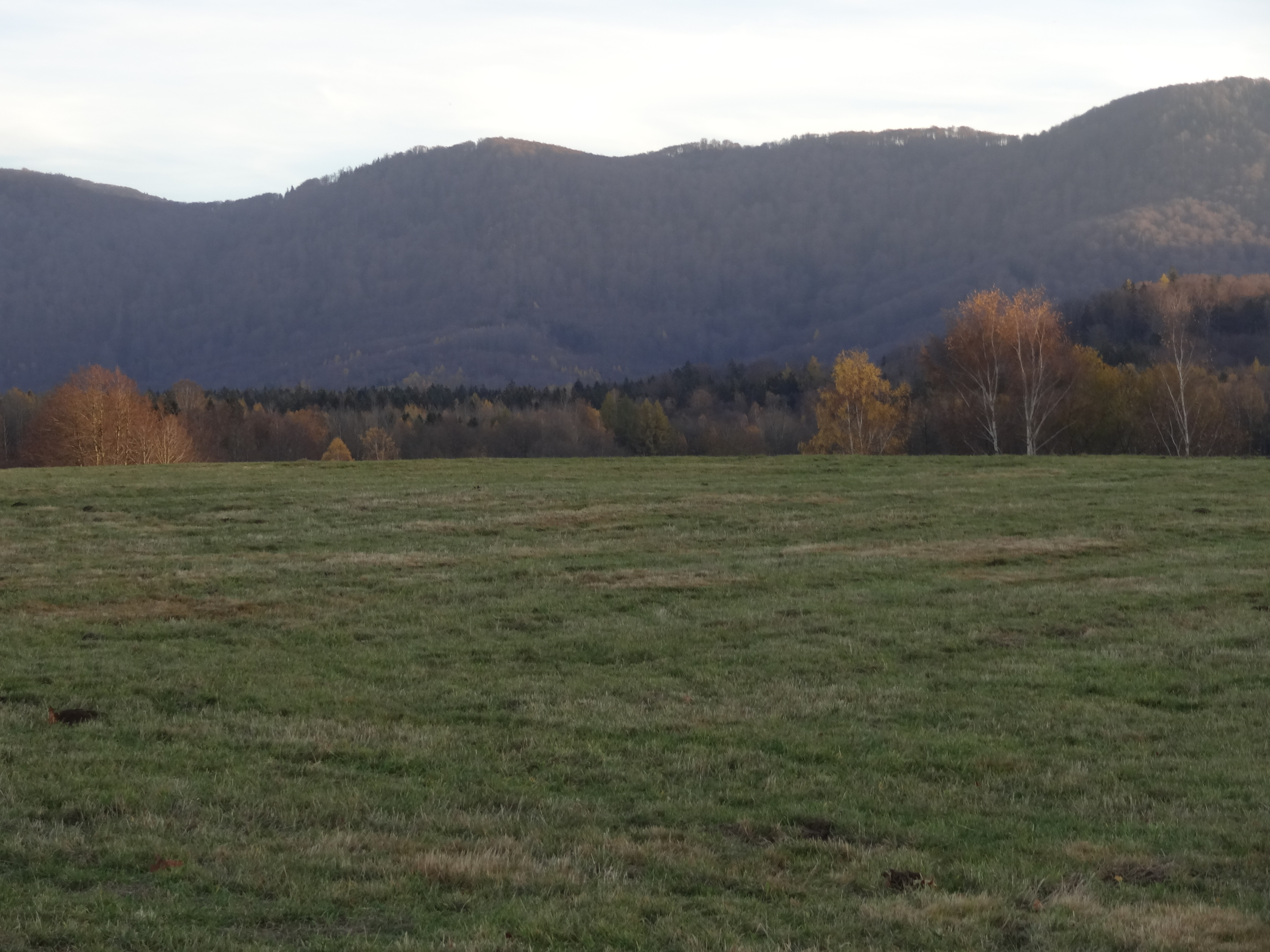 Poledník (864 m, bývalá NPR, dnes součást NPR Jizerskohorské bučiny) od samoty Dvořákov u Raspenavy